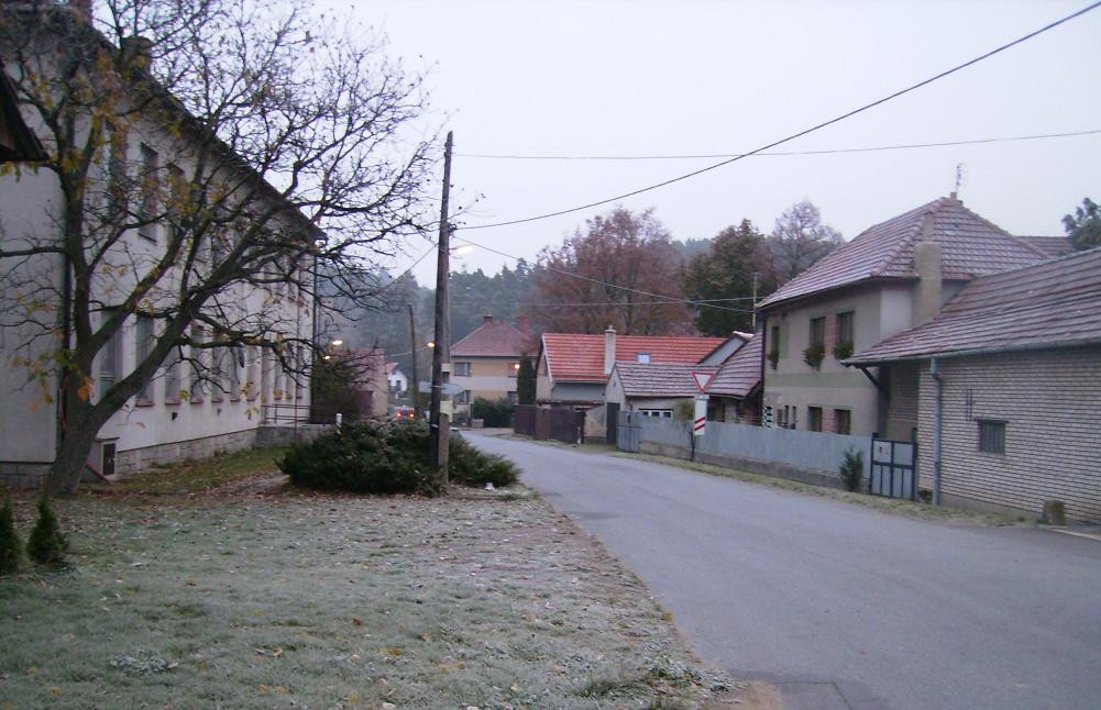 Vlčatín na Moravě (u Třebíče)